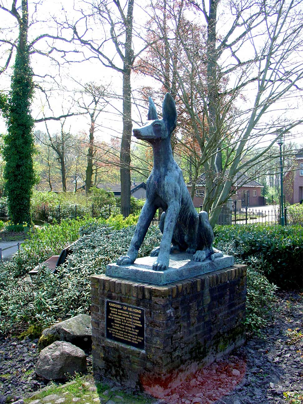 Helhond of kardoes door Pieter de Monchy in De Lutte - gemaakt in 1950 voor de textielfabrikant Molkenboer later gekocht door de gemeente Losser en bij de kerk aan de Plechelmusstraat geplaatst